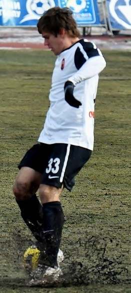 Максим Иванович Белый — украинский футболист.